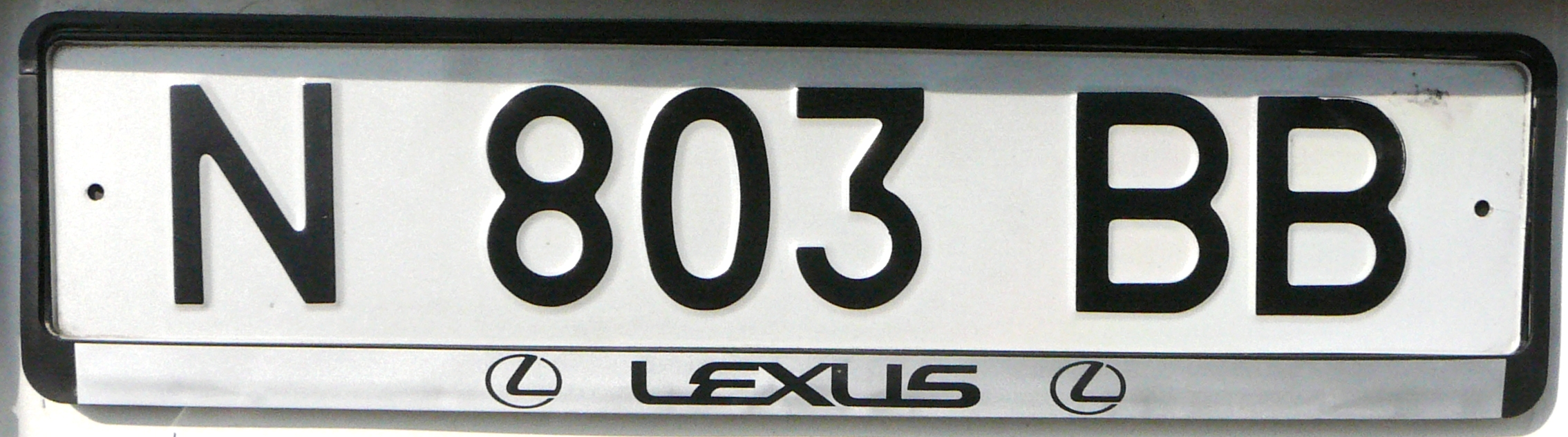 Казахстанский автомобильный номер выданный на юридическое лицо. Номер "N803BB". Буква "N" - перед цифрами обозначает "Кызылординская область"